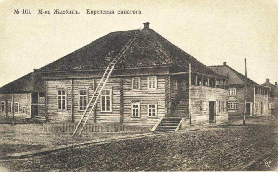 Беларуская (тарашкевіца): Жлобін (Žłobin). Сынагога